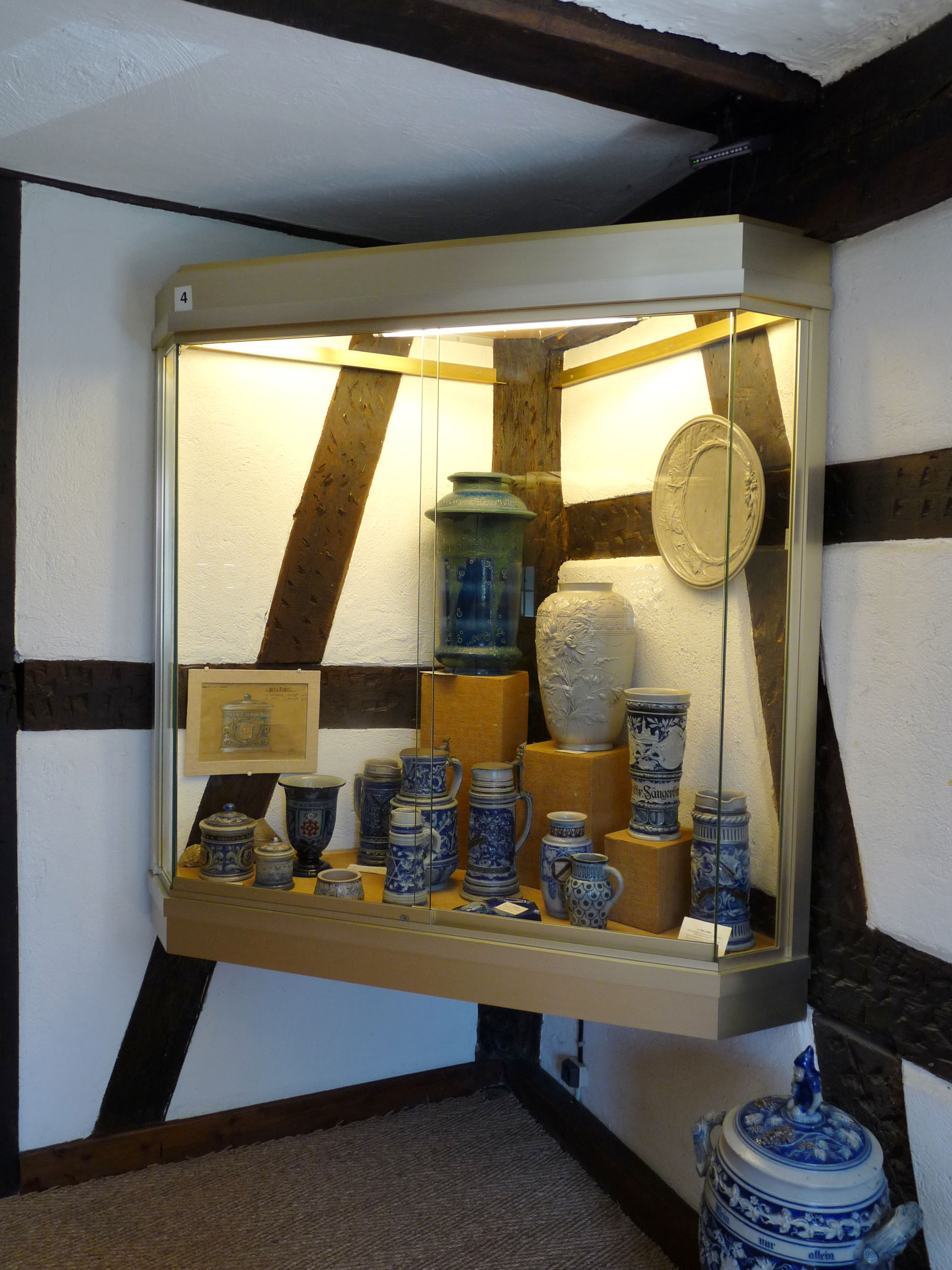 Musée de la poterie de Betschdorf (Bas-Rhin)